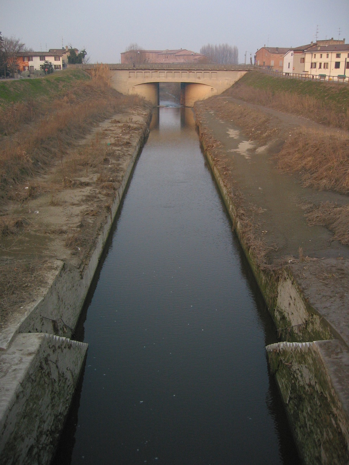 Bomporto, Emilia Romagna, Italia